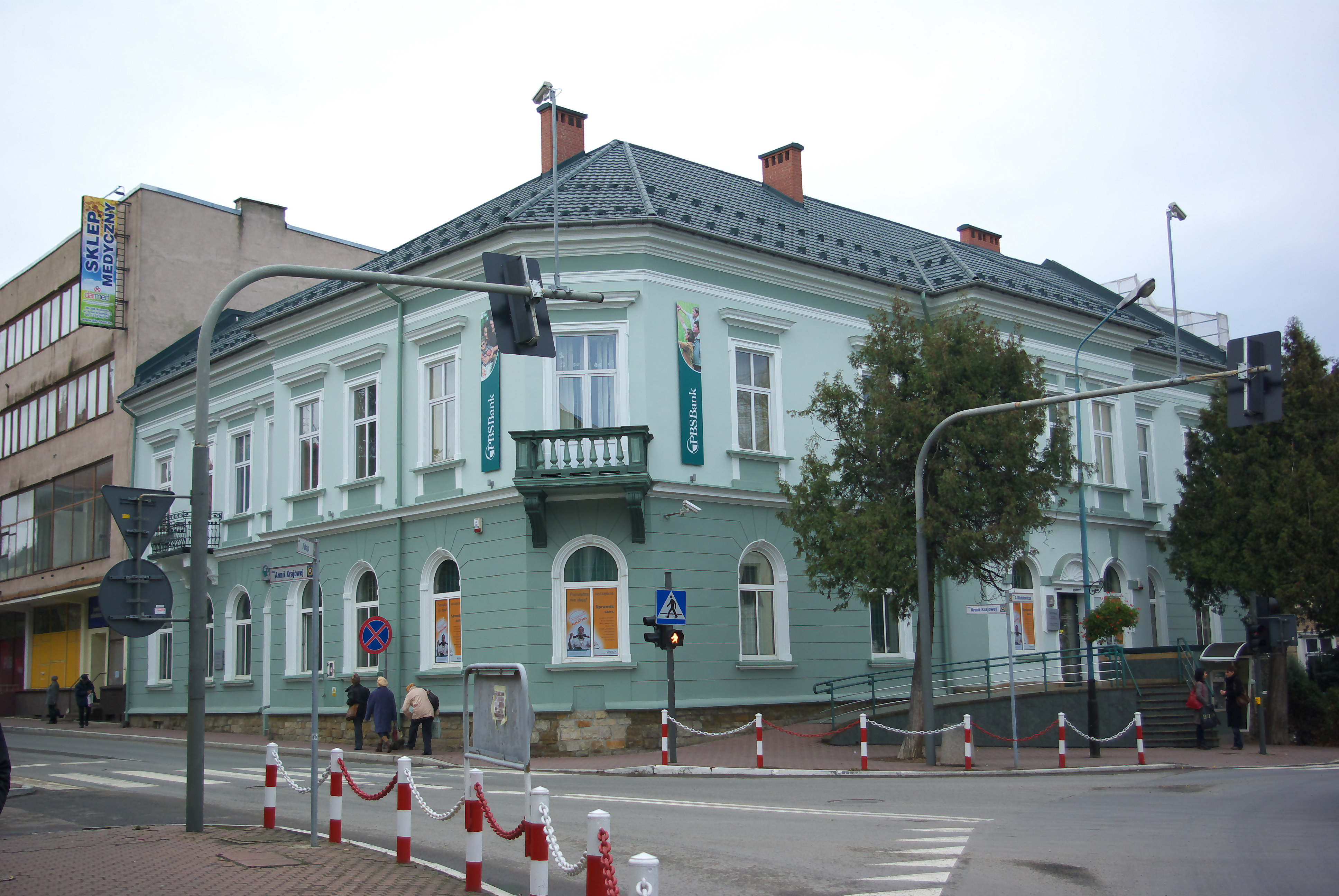 Budynek przy ulicy Mickiewicza 26 w Brzozowie. Projekt architekta Wilhelma Szomka. Dawniej Towarzystwo Zaliczkowe. Obecnie PBS Bank